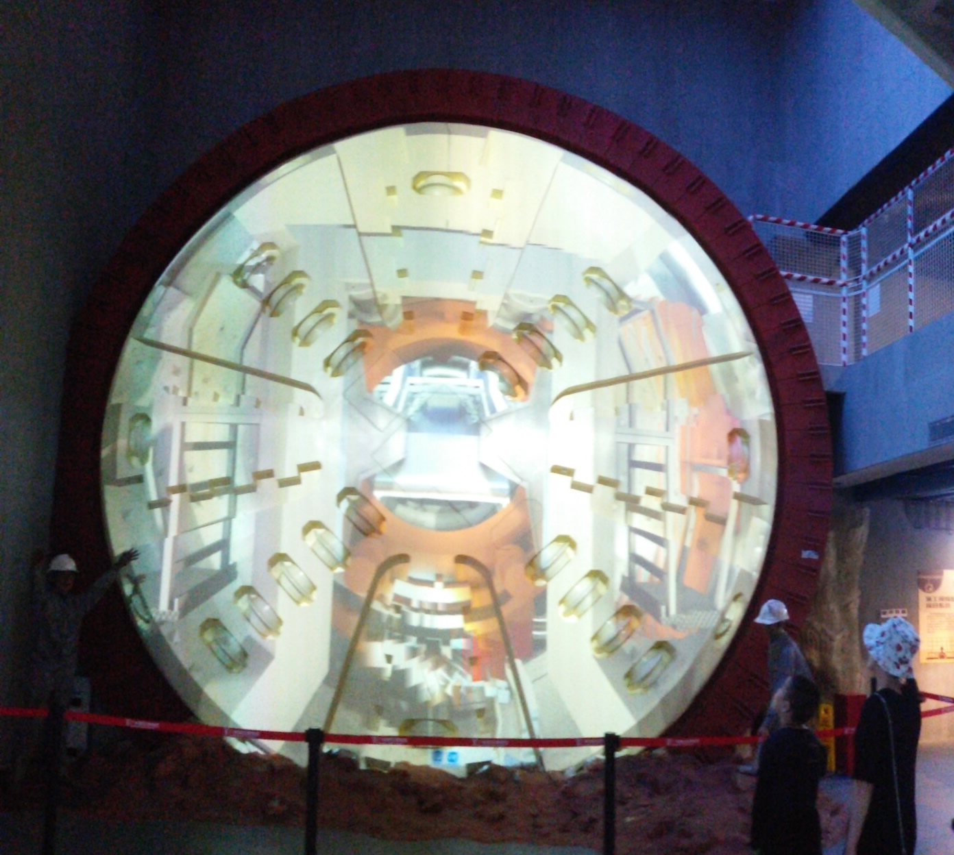 粵語: 喺廣州地鐵博物館搞展覽嘅盾構機模擬演示短片